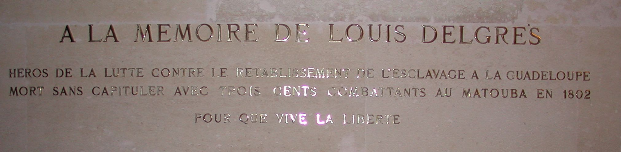 Plaque commémorative pour Louis Delgrès, Panthéon de Paris, France.